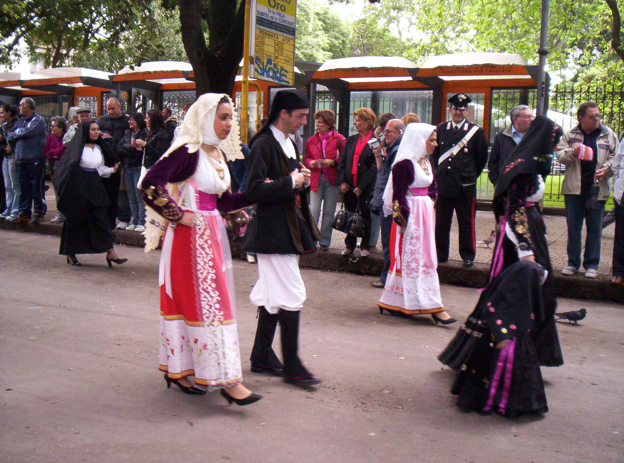 costume della sposa di Ossi